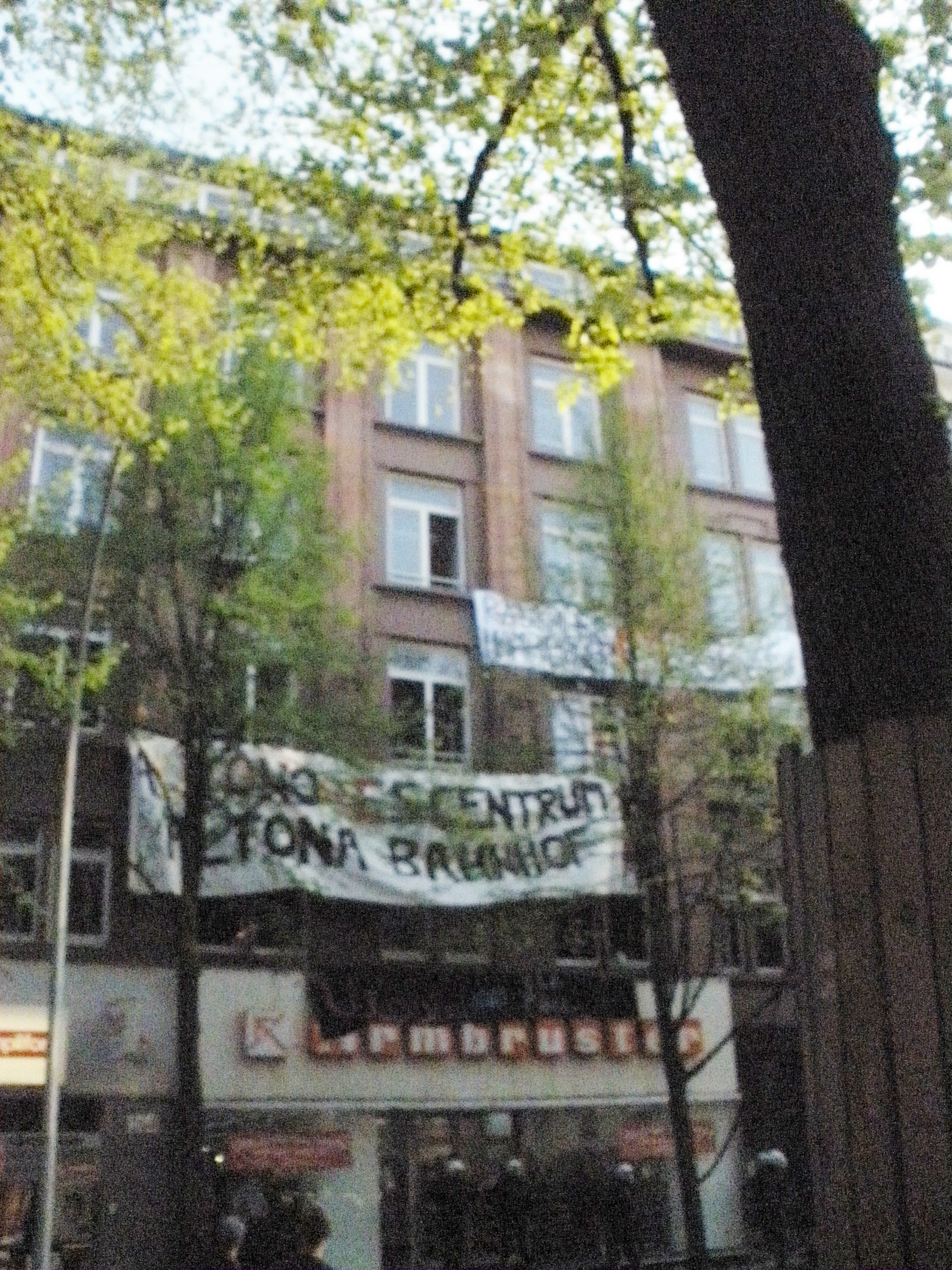 ehemaliges Finanzamt Hamburg-Altona Hausbesetzung